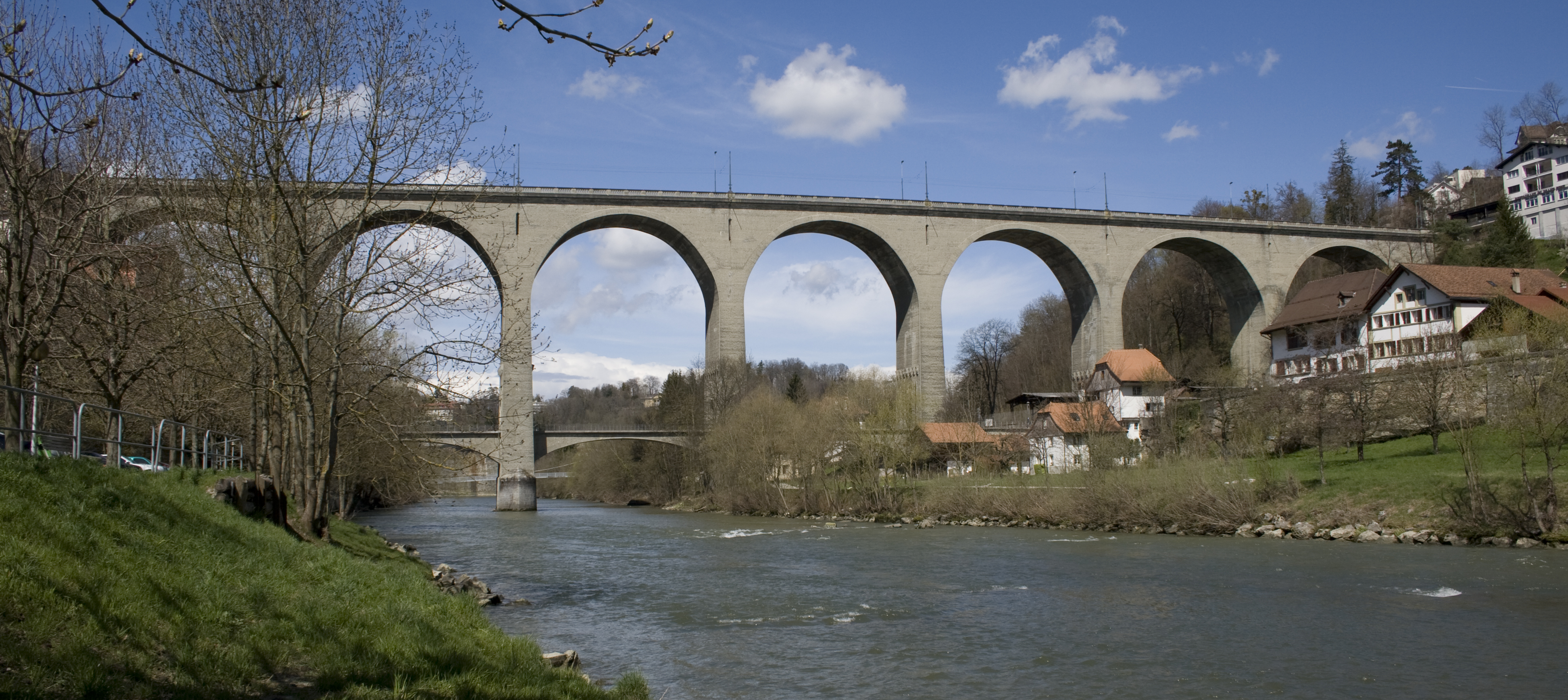 Le Pont de Zaehringena à Fribourg en Suisse.